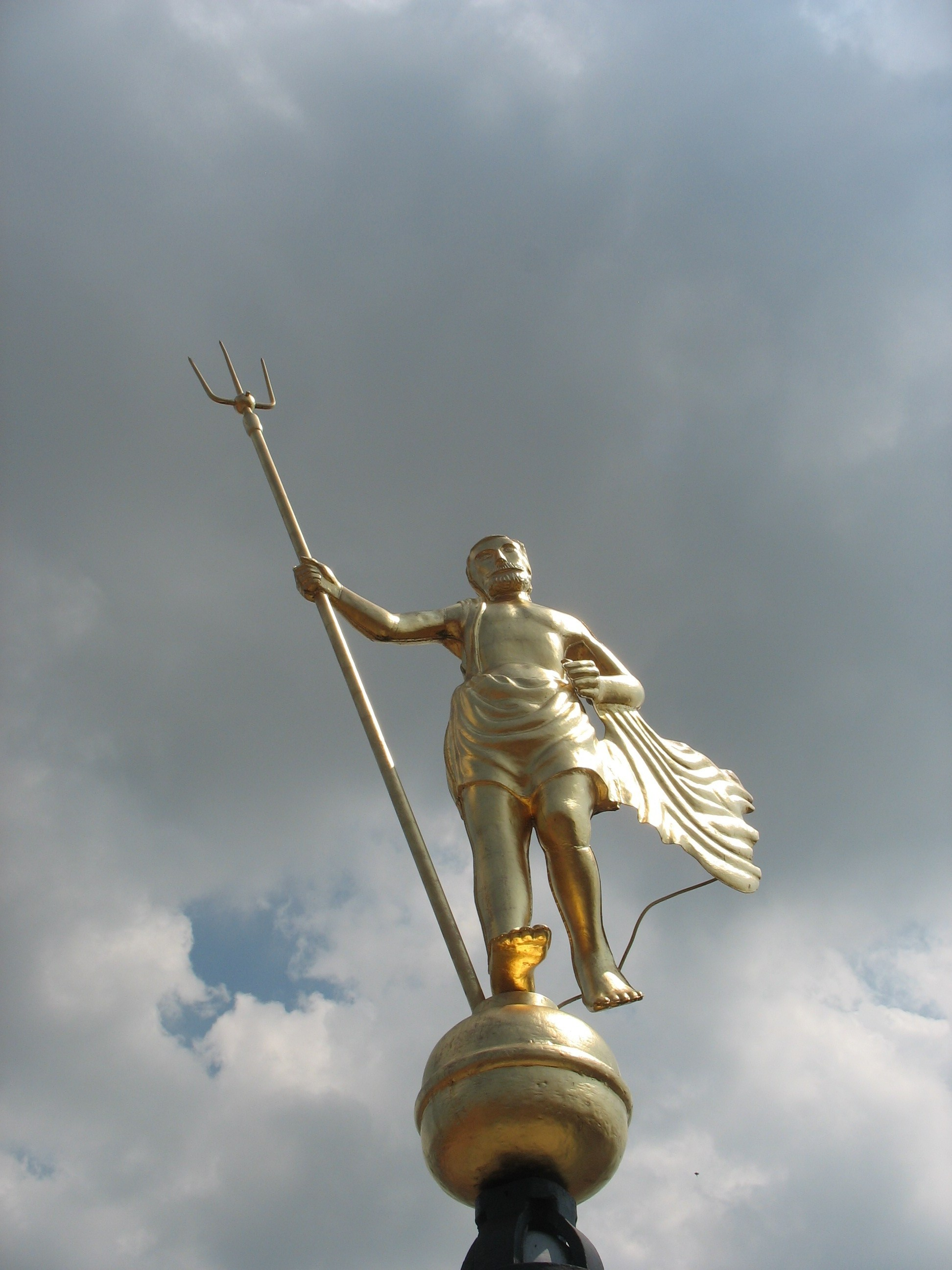 Foto van het Neptunus beeld bovenop het Stadhuis te Zierikzee.